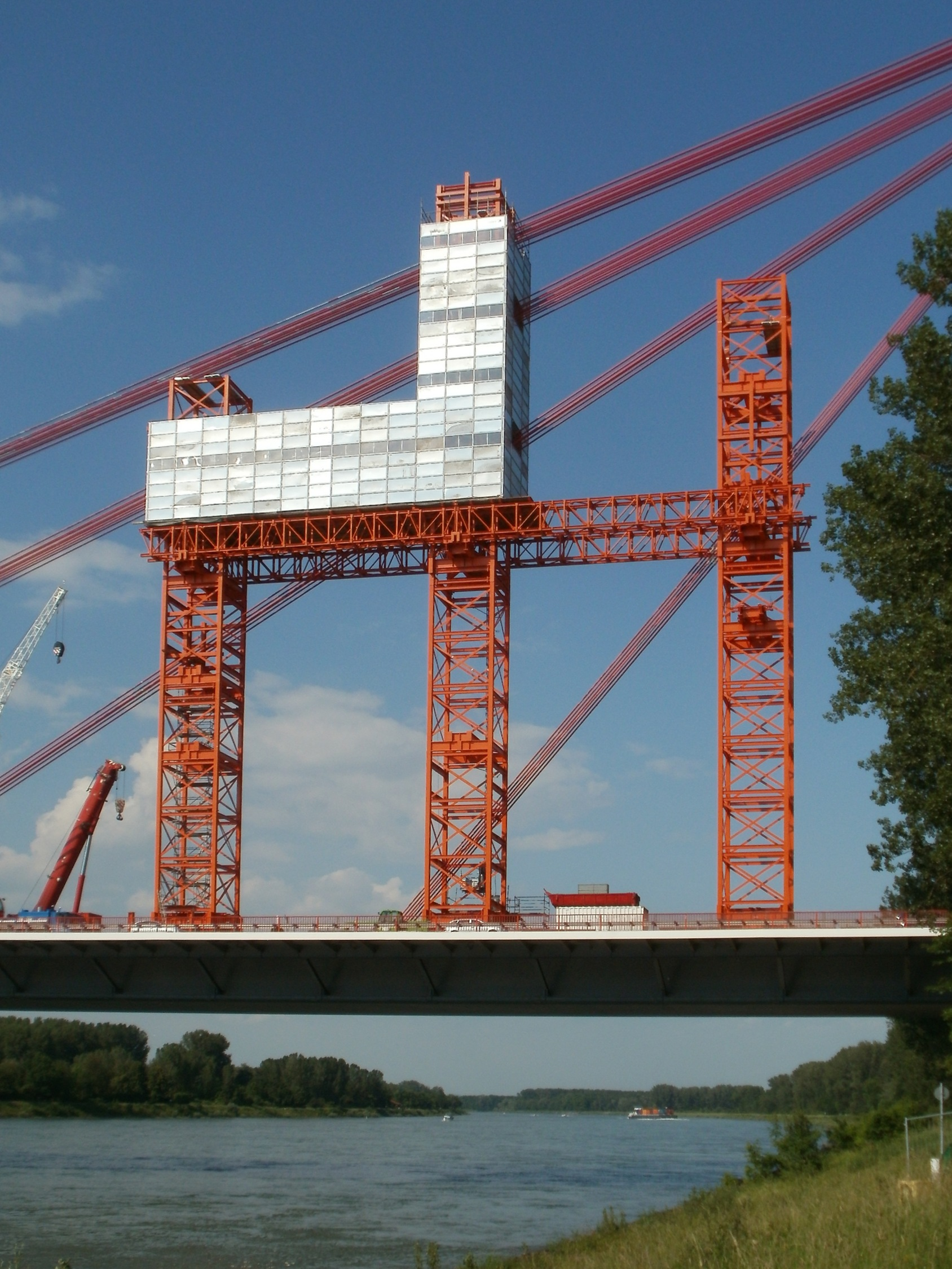 Autobahnbrücke (A61) bei Speyer